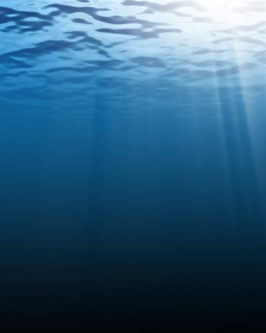 Deep blue sea